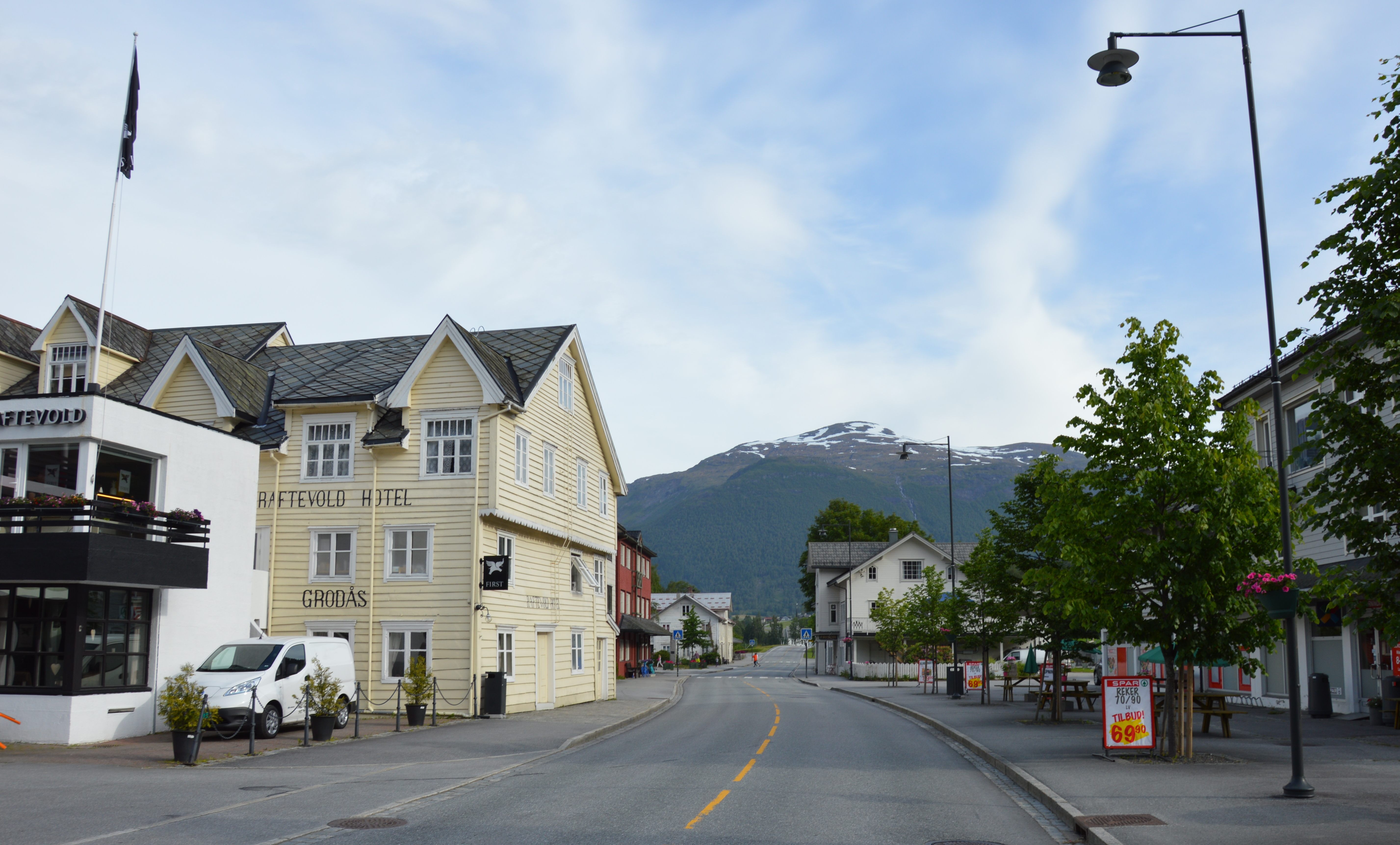 Hauptstraße in Grodås